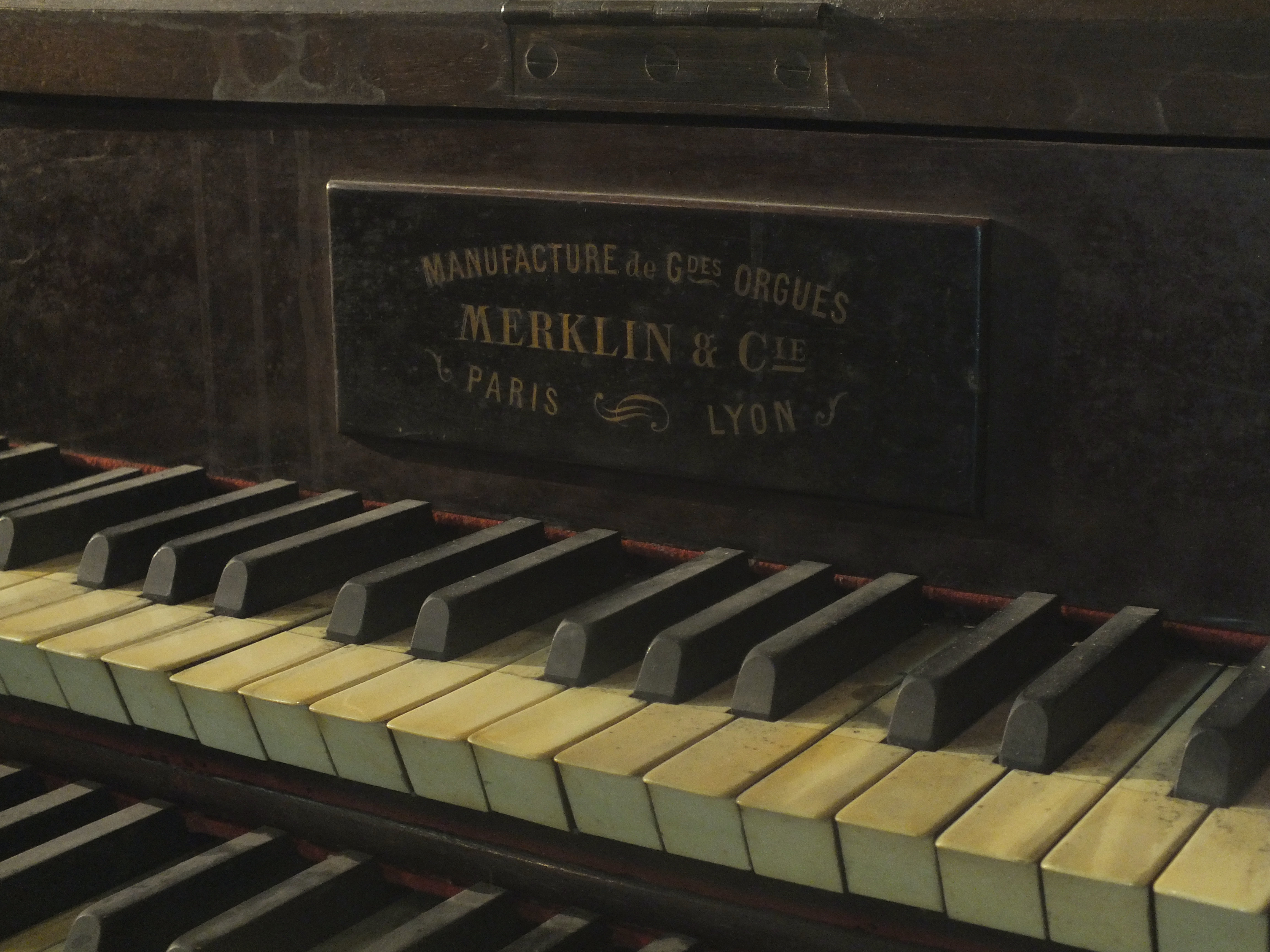 Claviers et plaque "Merklin & Cie" de la grande console (principale, à 3 claviers + pédalier) de l'orgue Merklin (1885) de l'église Saint-Nizier de Lyon (69, Rhône, France).